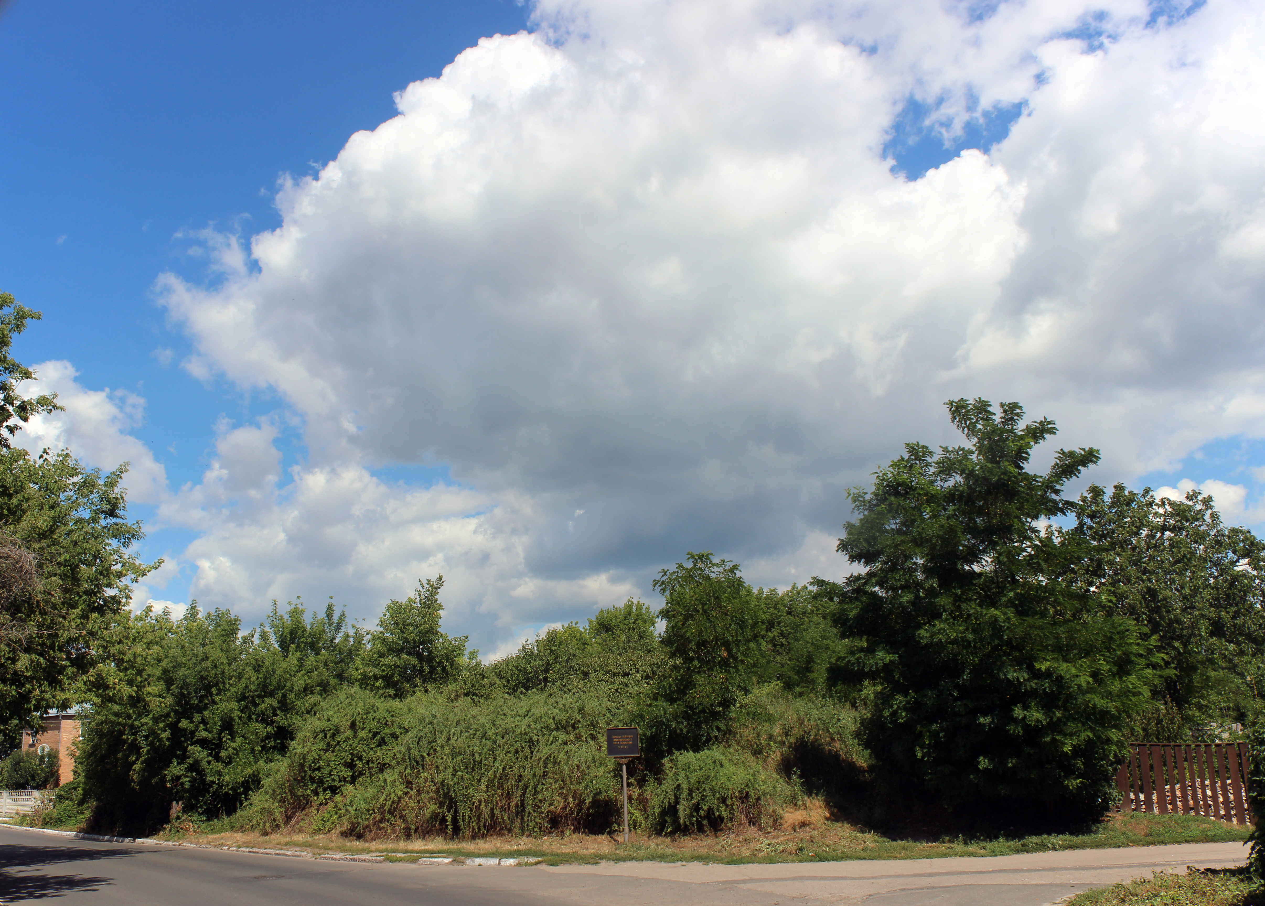 Земляні укріплення дитинця і міста, Переяслав-Хмельницький